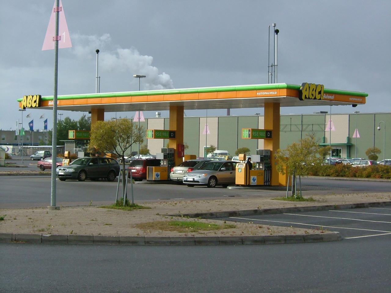 ABC petrol station in Limingantulli, Oulu, Finland